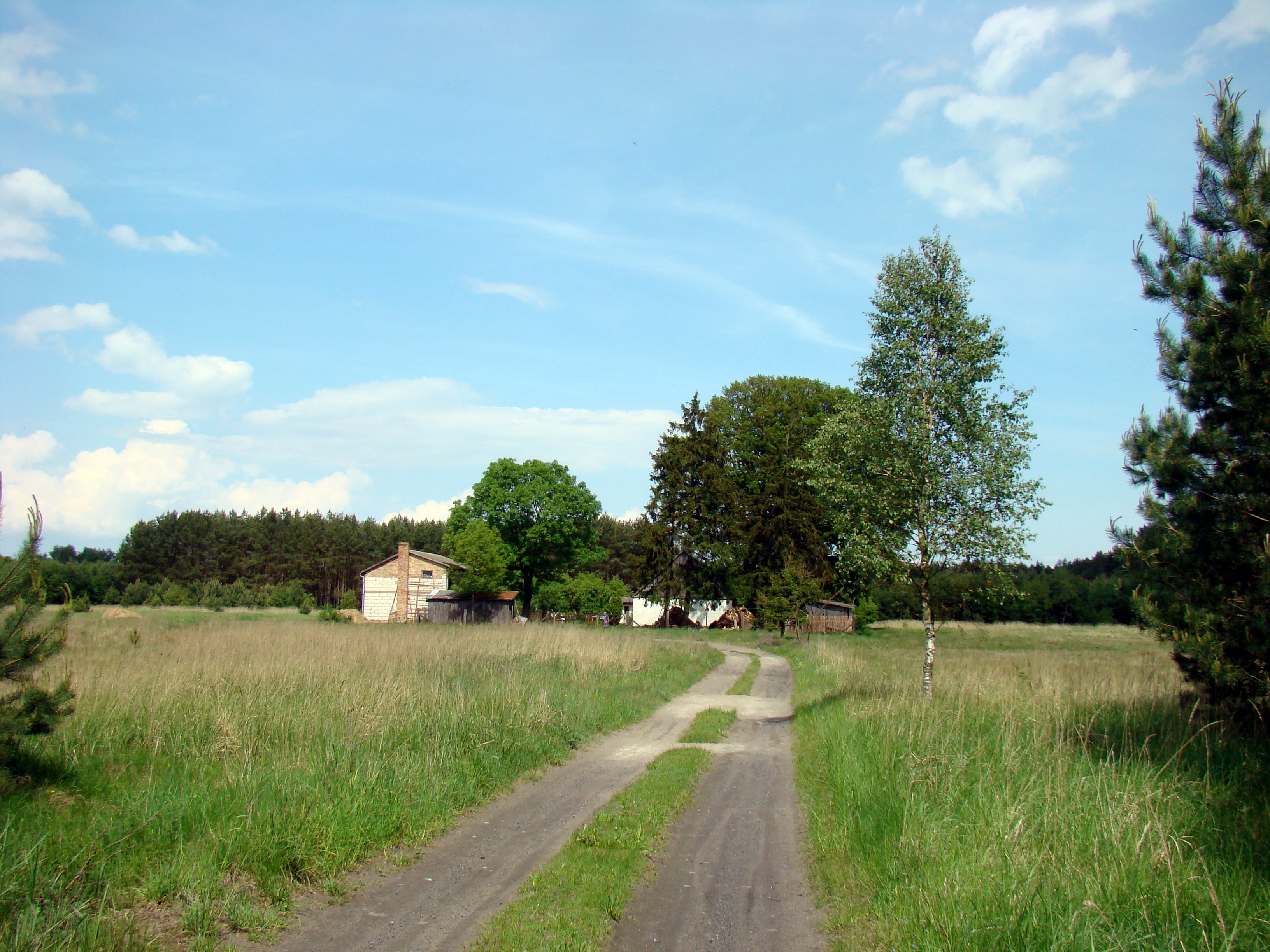 Karpin (część zabudowań), Puszcza Wkrzańska, (Powiat policki, Województwo zachodniopomorskie), Polska